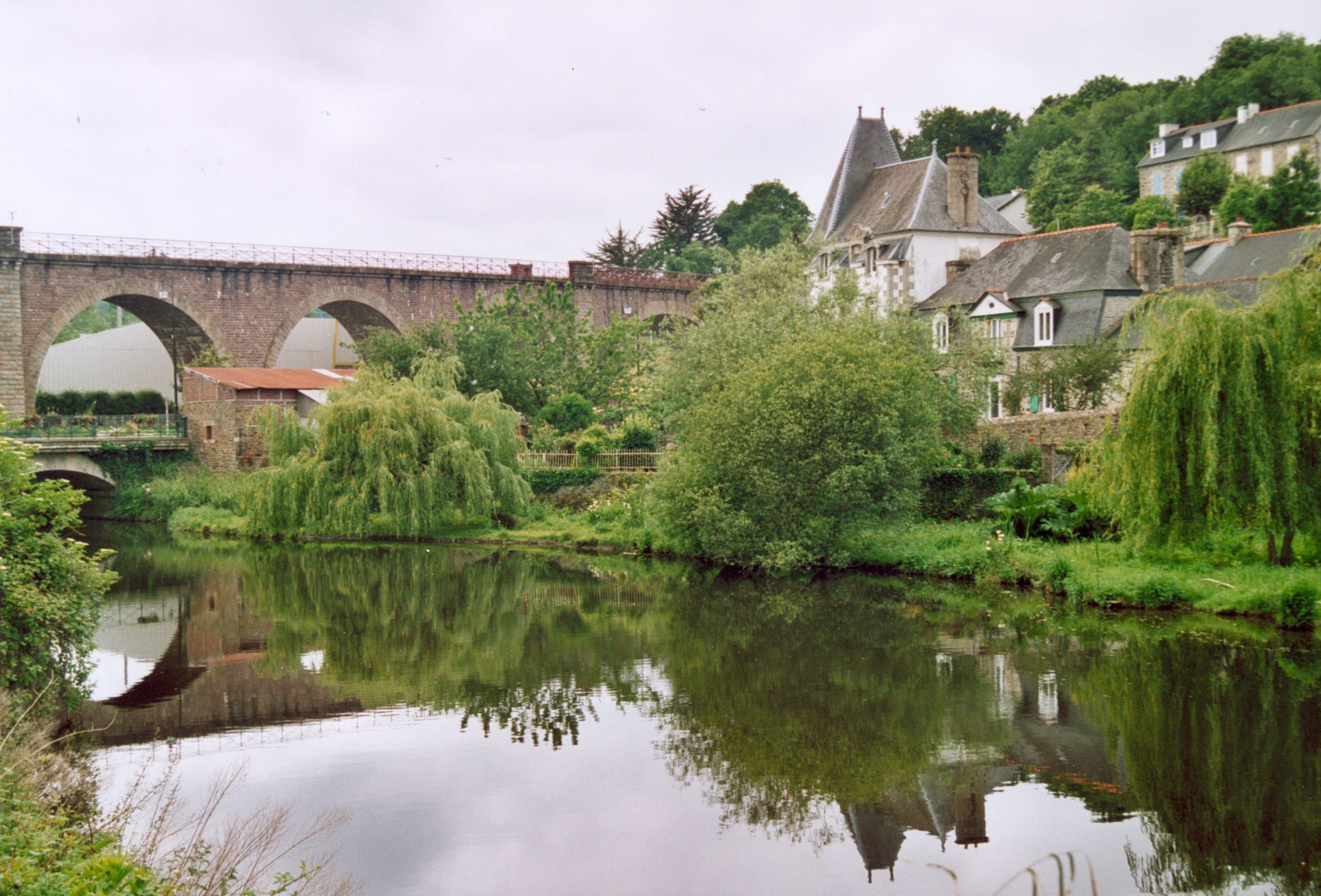 France Bretagne Côtes d'Armor Viaduc à Pontrieux Photographie prise par GIRAUD Patrick